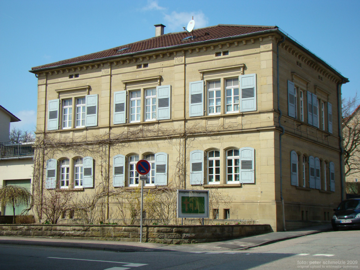 Historisches Pfarrhaus Kaiserstr. 3 in Eppingen